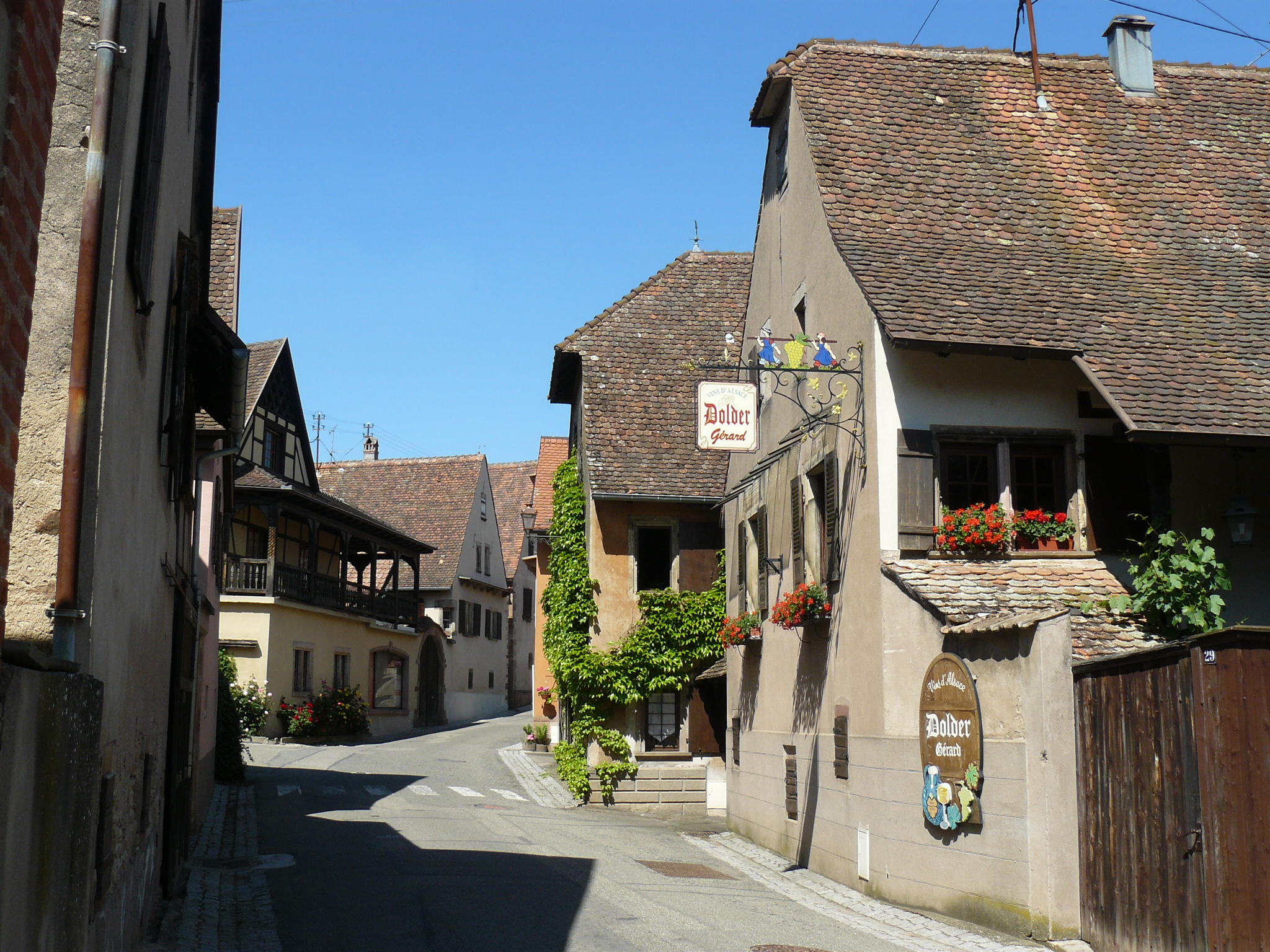 Maisons à colombages à Mittelbergheim